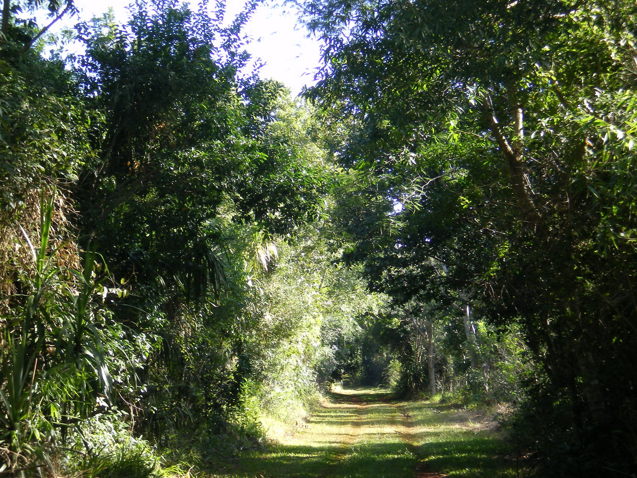 Fotos de los refugios y reservas de Itaipu, tomadas en los años 2007 y 2008 por mí